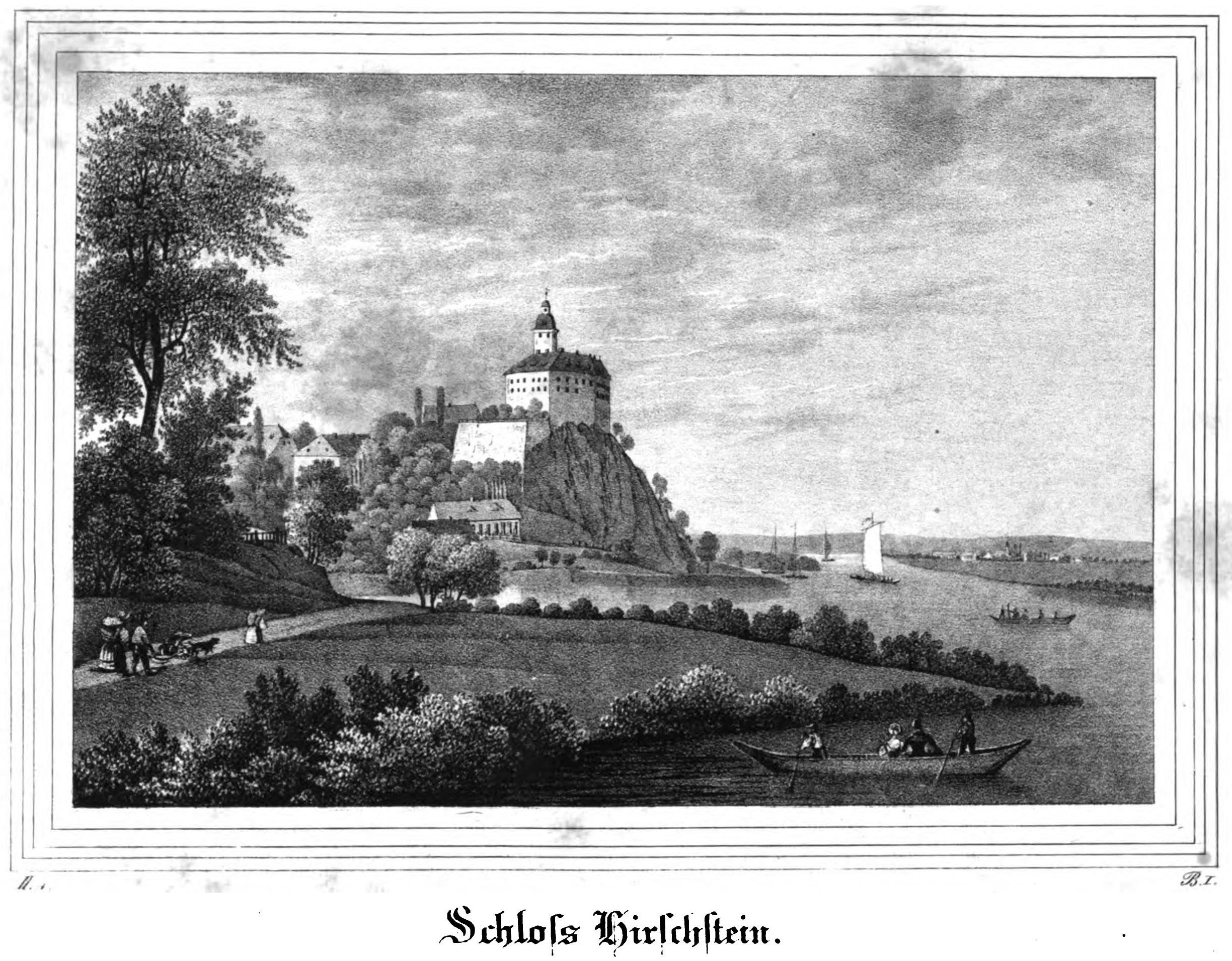 Saxonia Museum für saechsische Vaterlandskunde. Band 2. Dresden: Pietzsch und Comp. Siehe File:Saxonia Museum für saechsische Vaterlandskunde II.djvu